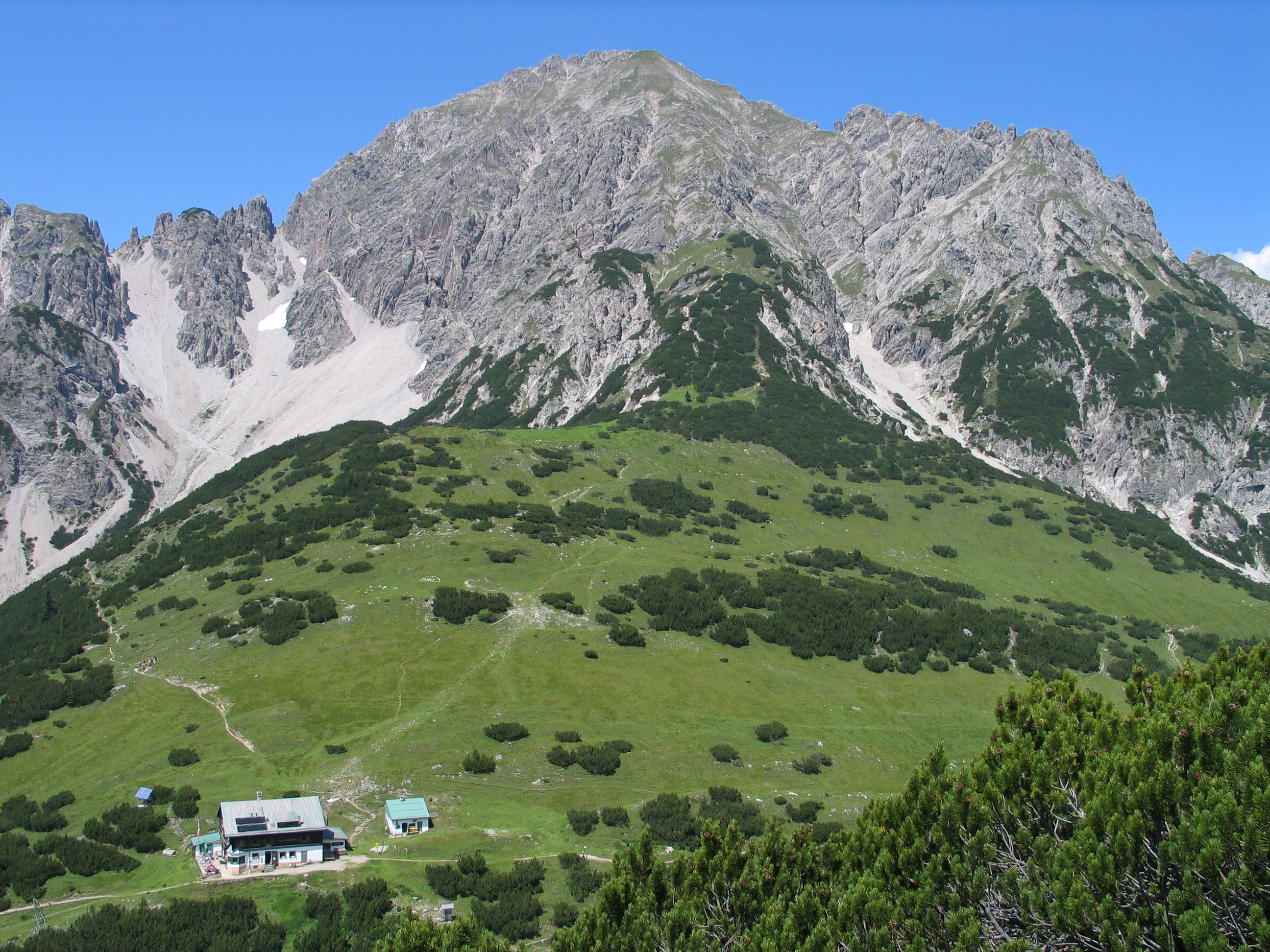 Solsteinhaus, Karwendel Photograph: Luidger (16. Juli 2006)